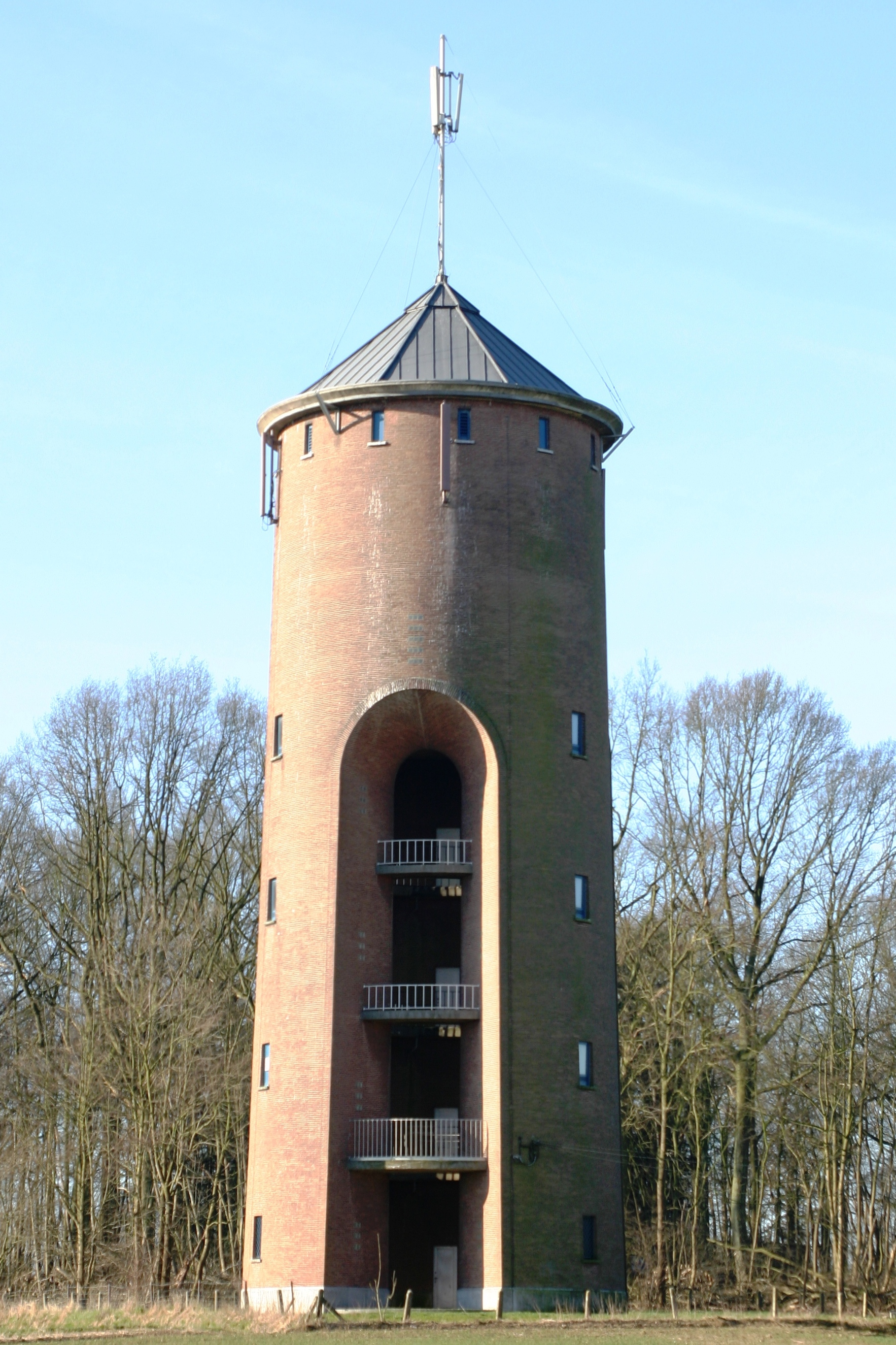 Château d'eau a Borlez